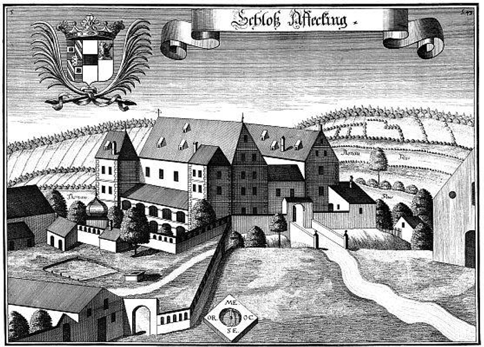 ehemaliges Schloss Affecking, Landkreis Kelheim, Niederbayern:Kupferstich von Michael Wening um 1700